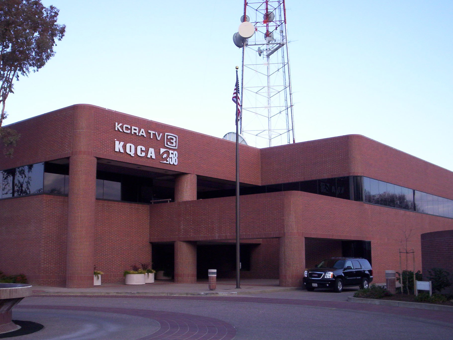 KCRA Studios